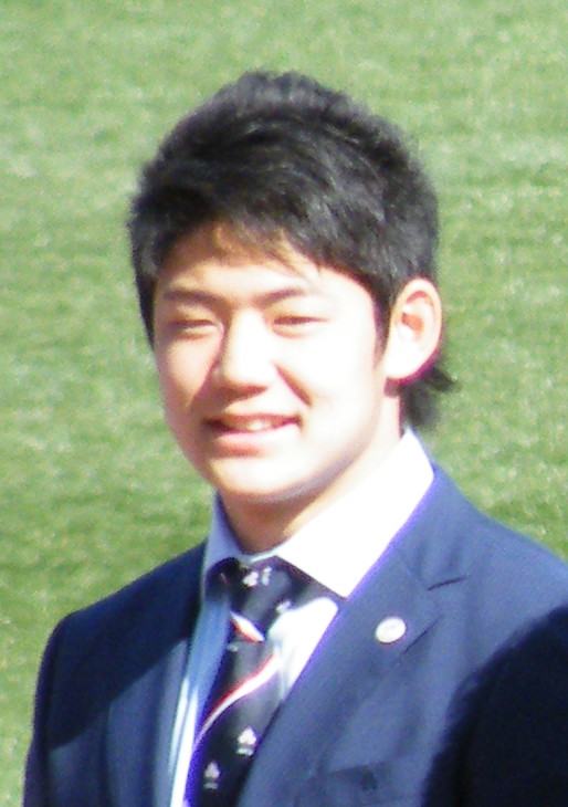 第50回日本ラグビーフットボール選手権大会決勝戦試合前の日本代表キャップ授与式での藤田慶和選手